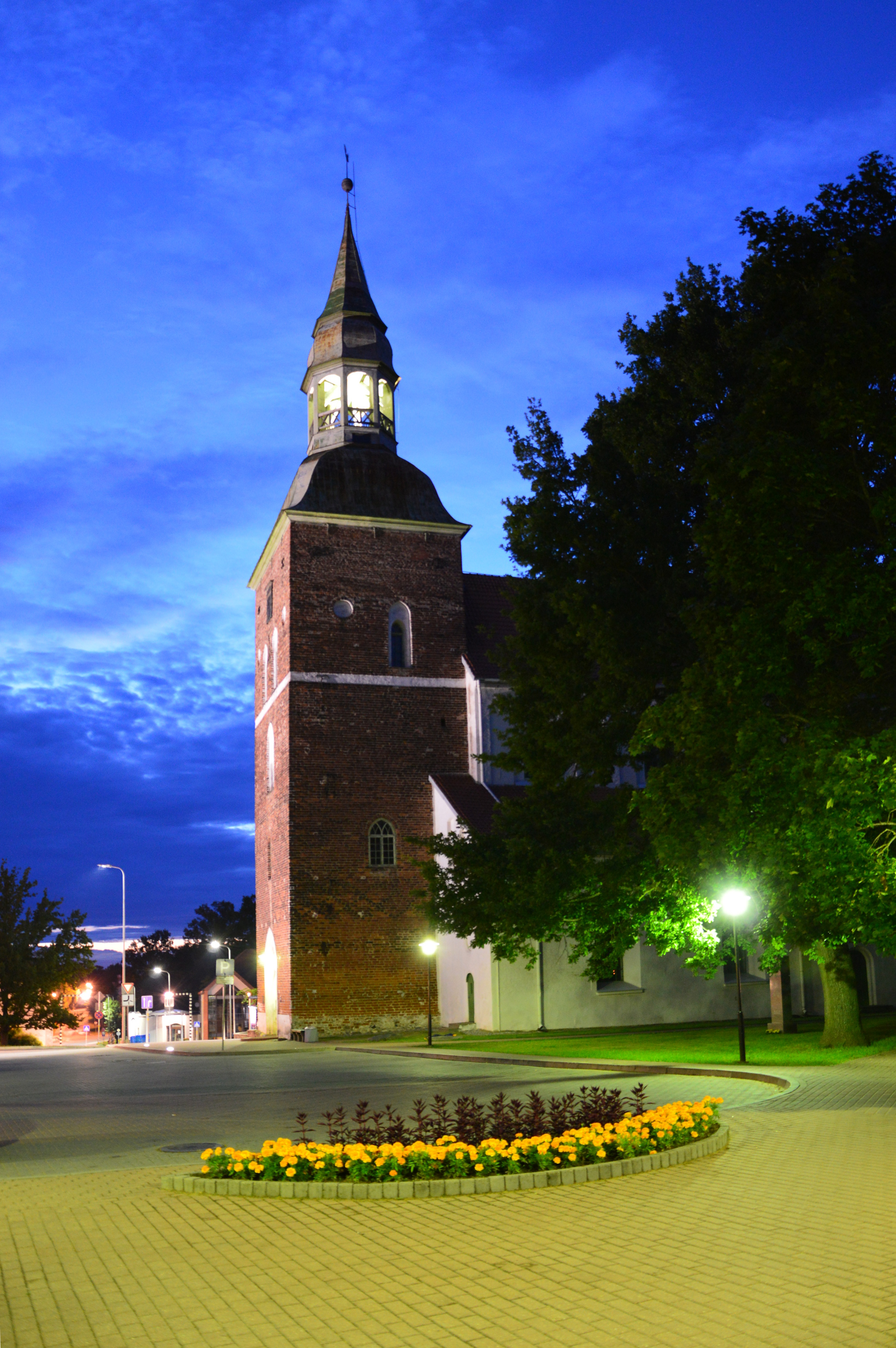 Valmiera luteri kirik